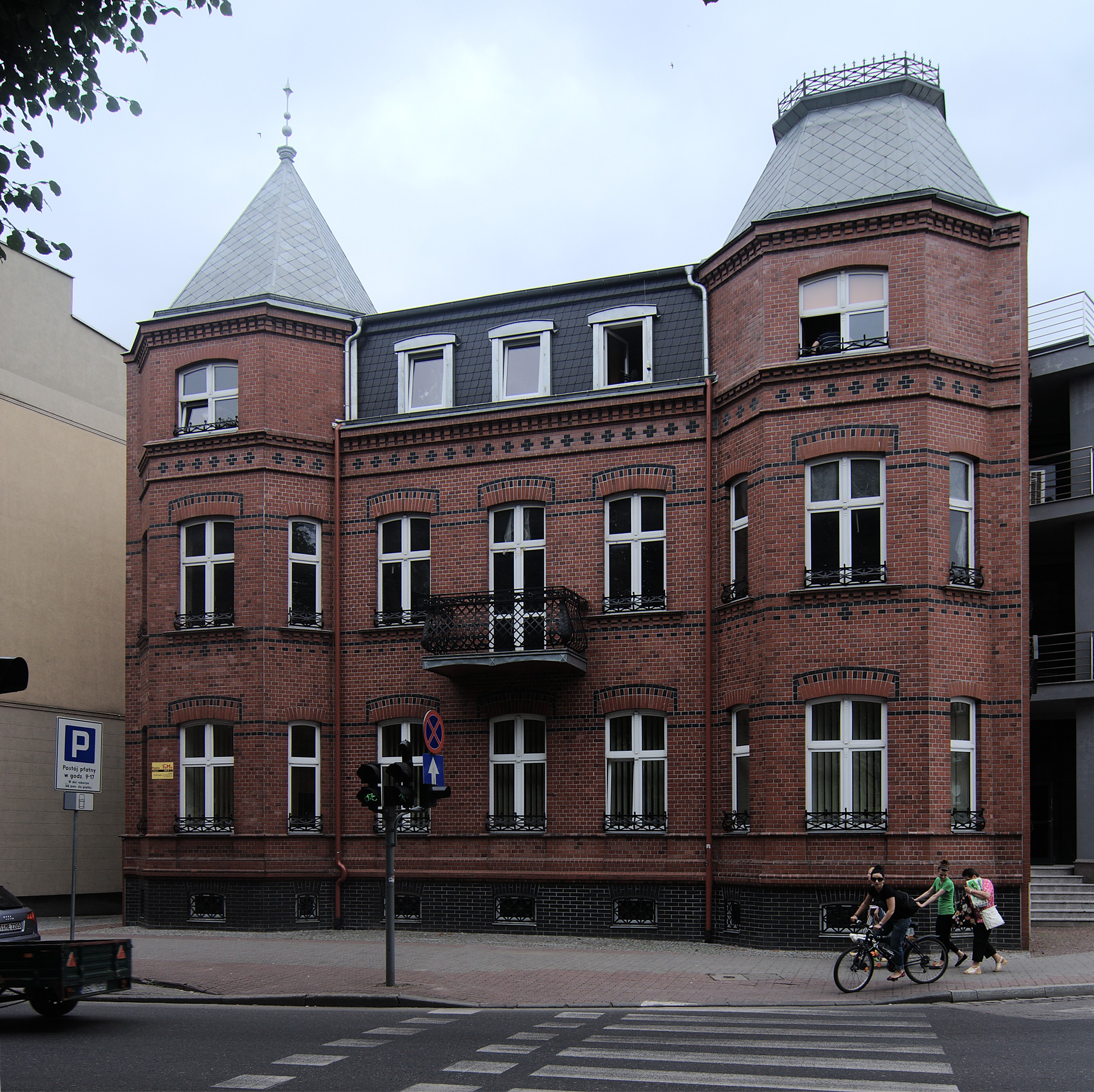 Słupsk. Sienkiewicza 9.